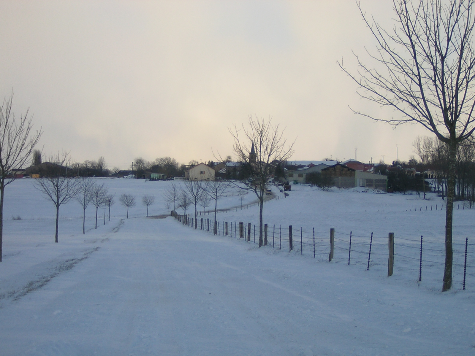 Vue de Puxieux en venant de Sponville.